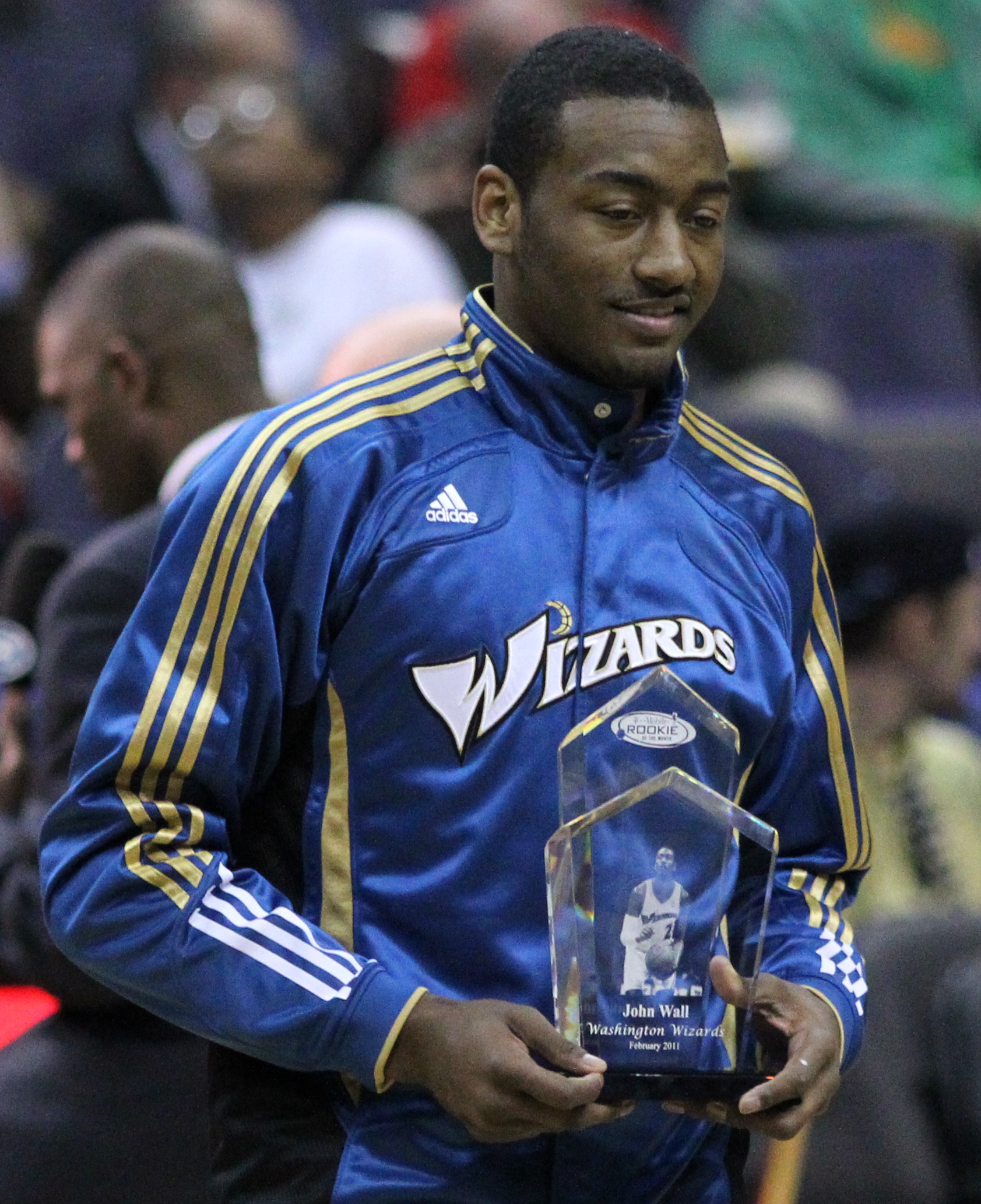 Wizards v/s Thunder 03/14/11